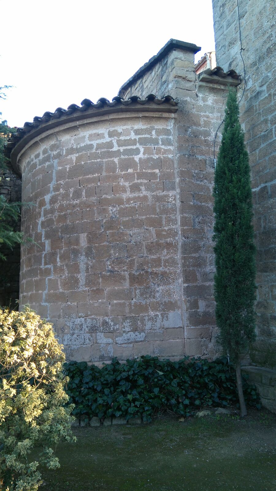 Absis